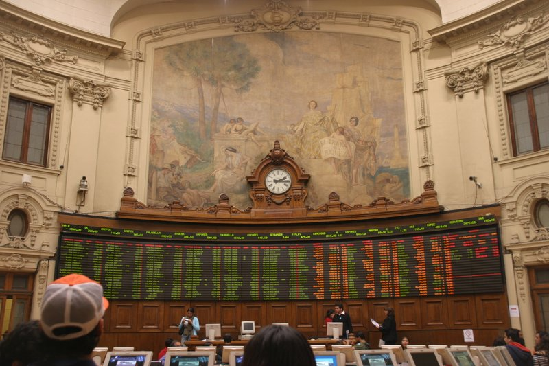 Интерьер фондовой биржи в Сантьяго